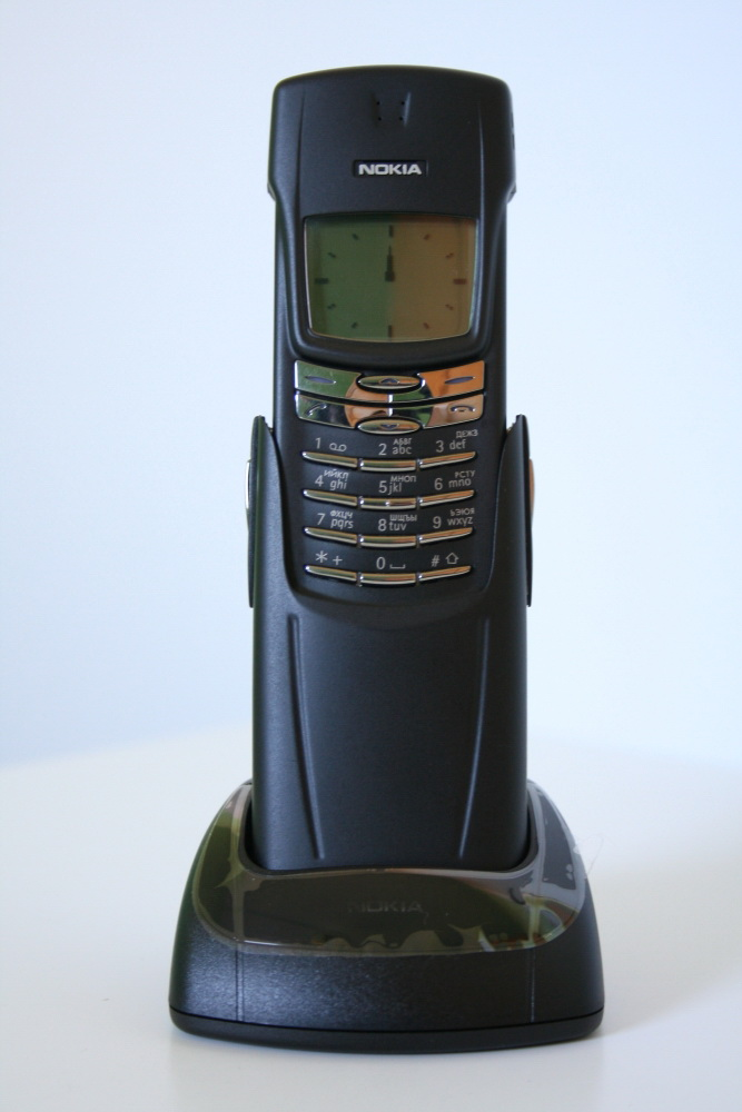 nokia 8910 black DCV-4